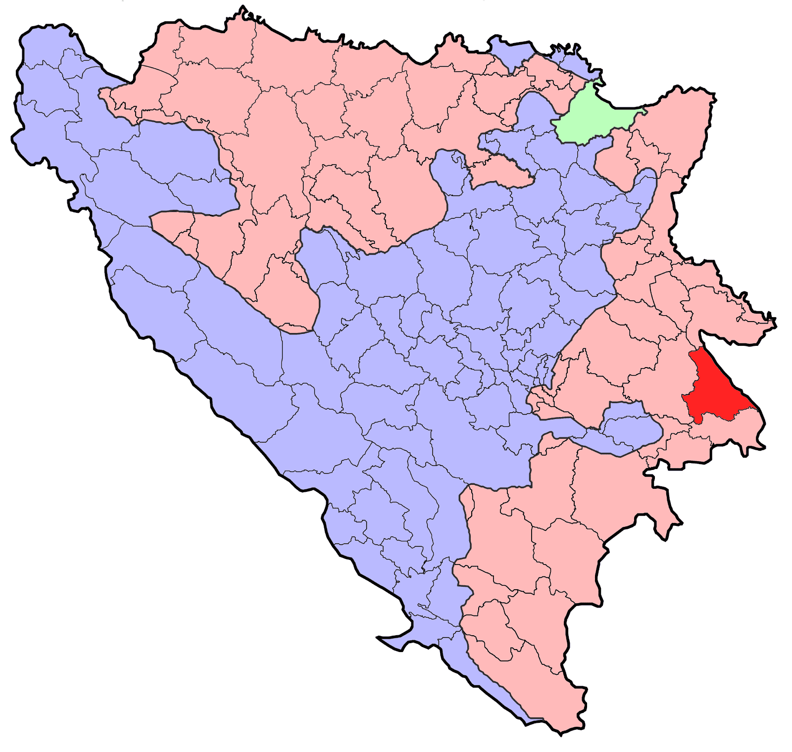 Republika Srpska (BiH) municipality